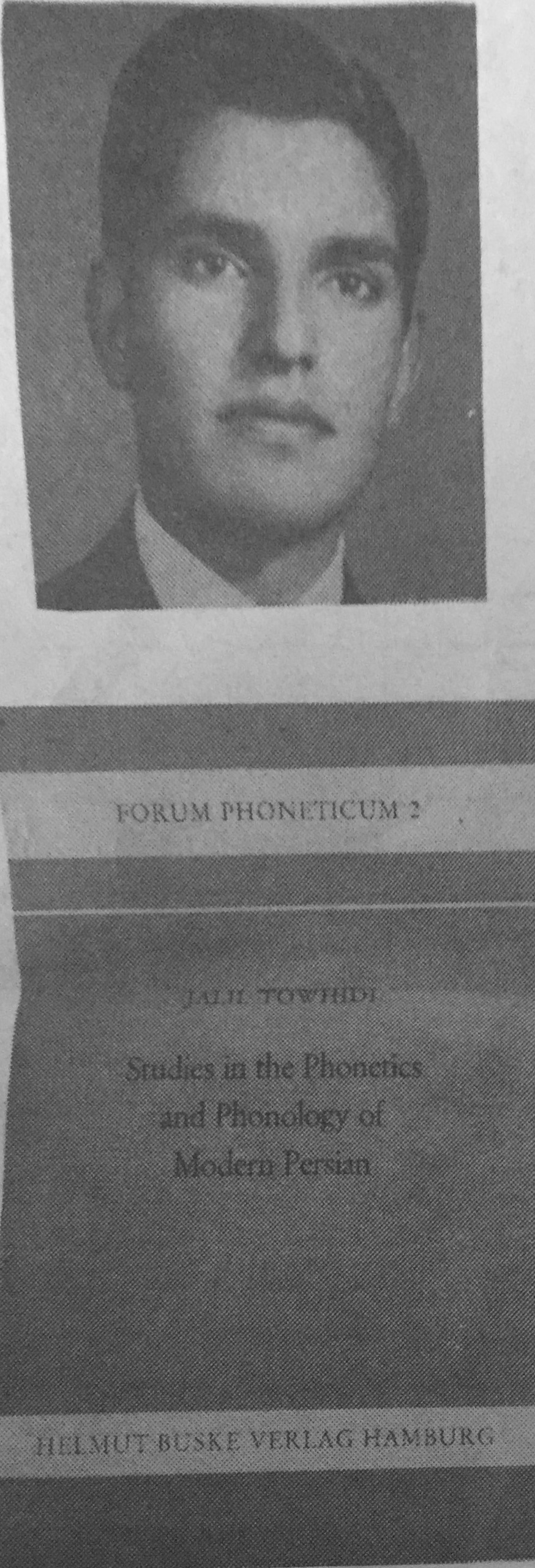 دکتر جلیل توحیدی